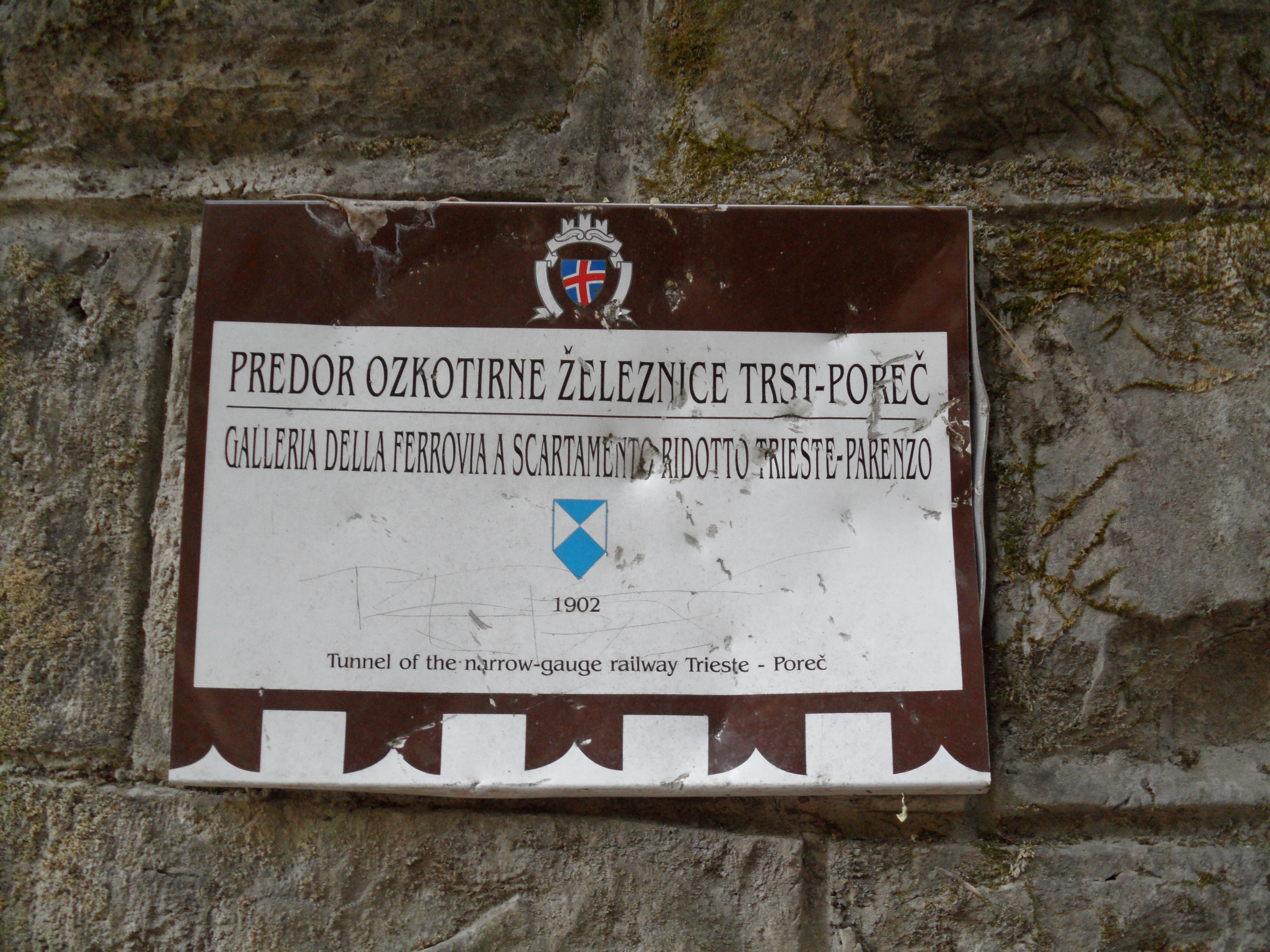 Predor nekdanje ozkotirne železnice med slovenskima obalnima mestoma Portorož in Strunjan